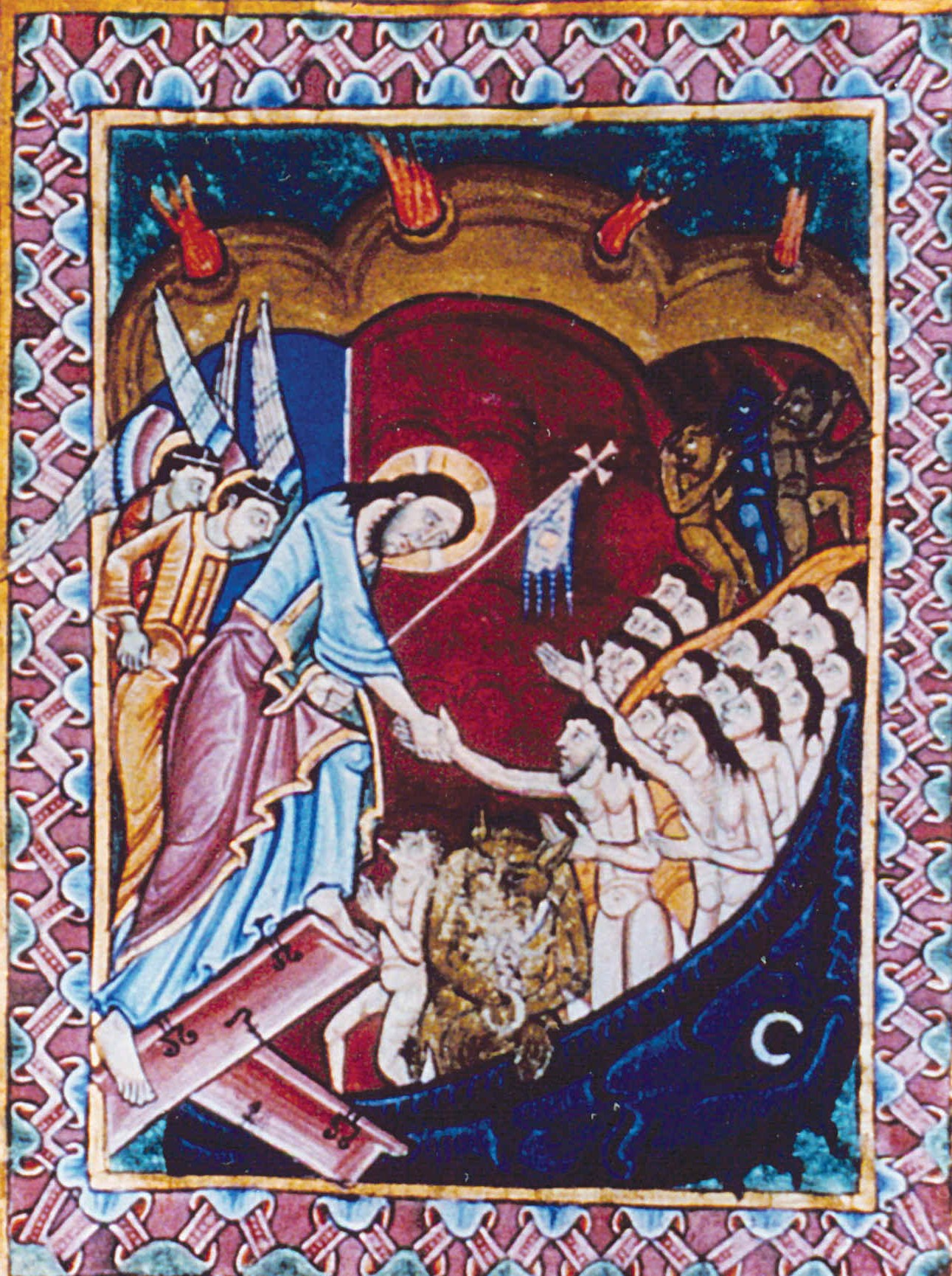 Albani-Psalter: Abstieg Christi ins Totenreich